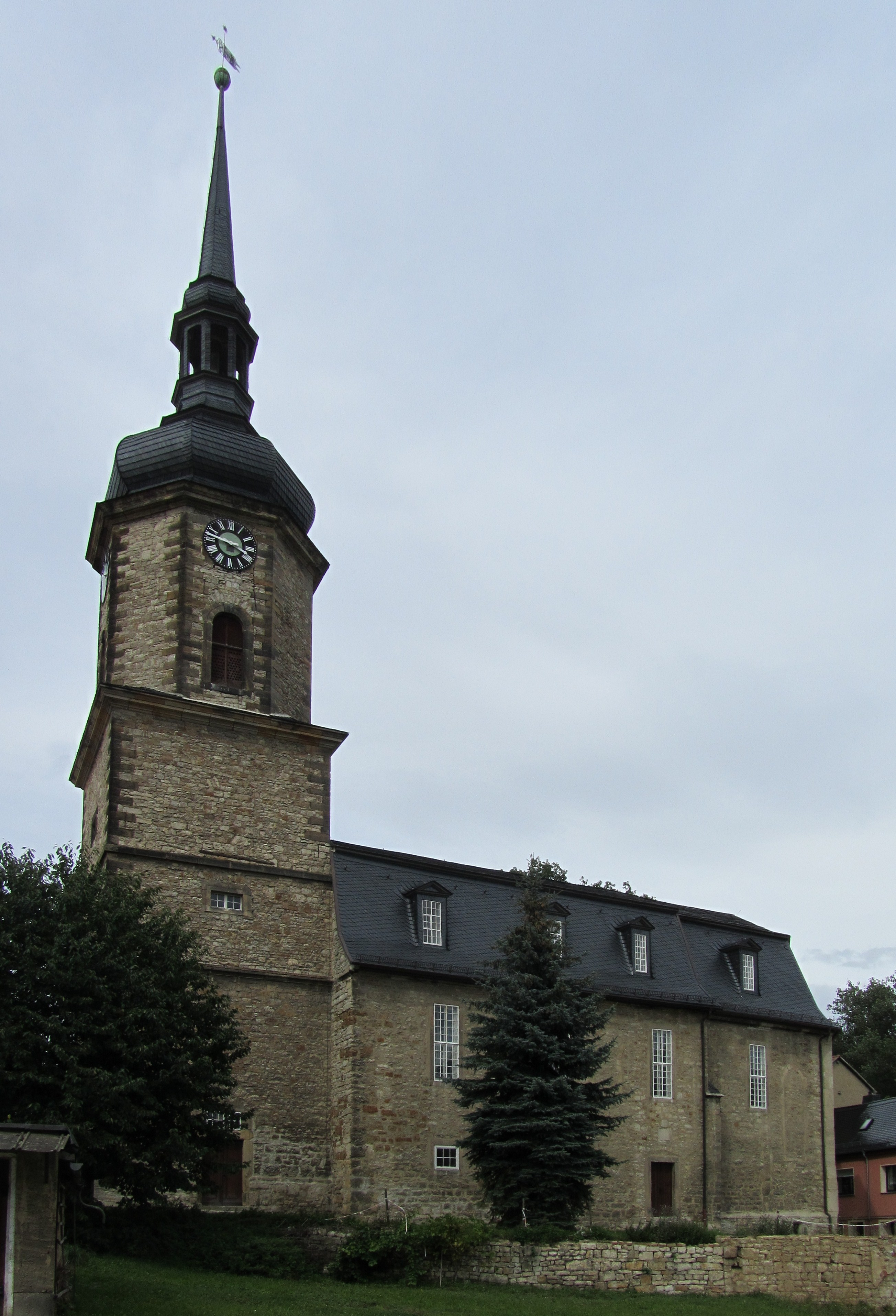 Die Kirche von Bad Sulza (Thüringen).